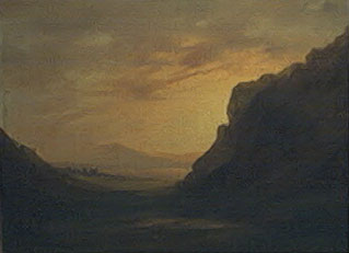 paisaje de antonio smith